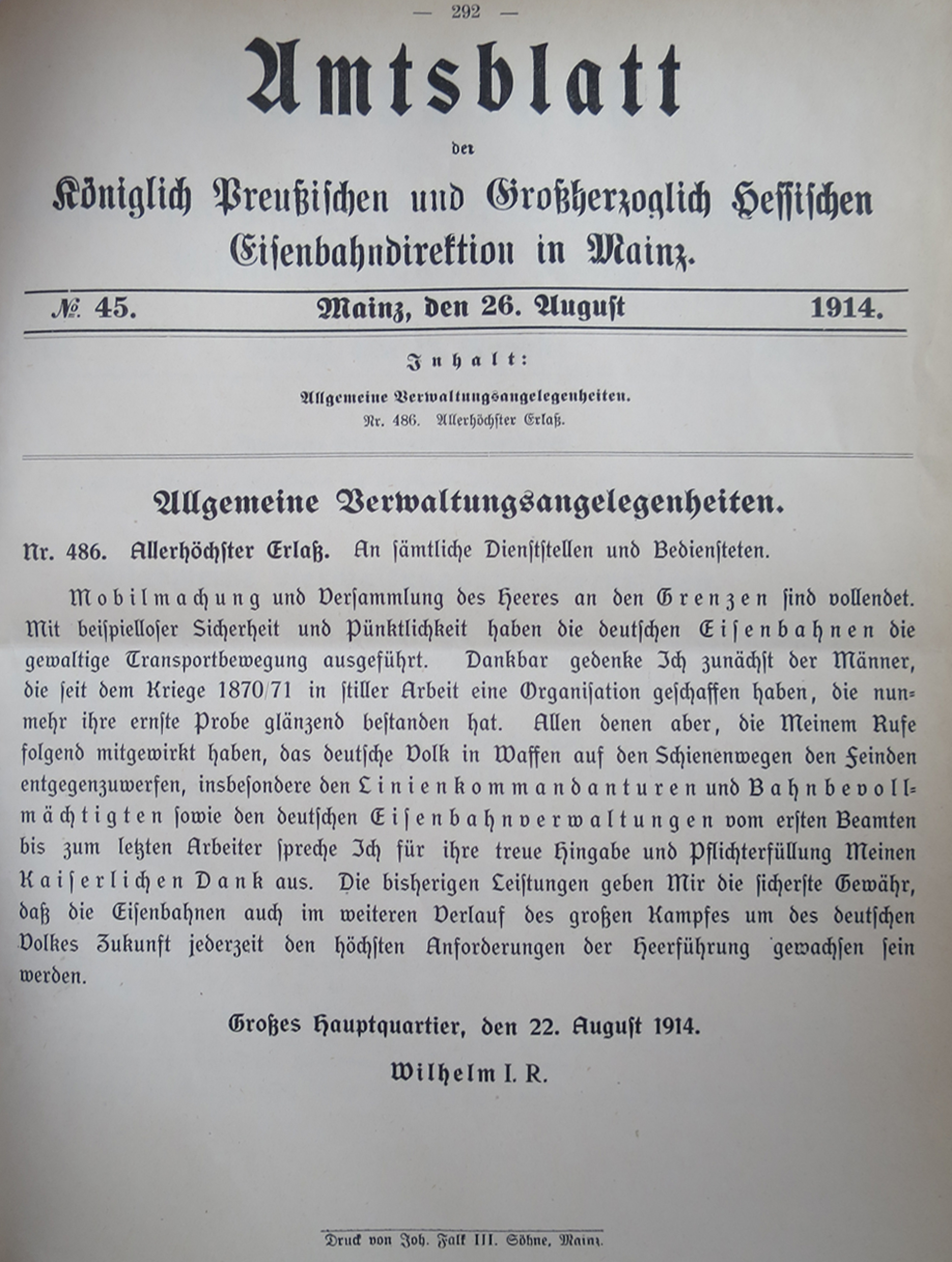 Dank Kaiser Wilhelm II. an die Eisenbahner für deren Leistungen während der Mobilmachung vom 26. August 1914